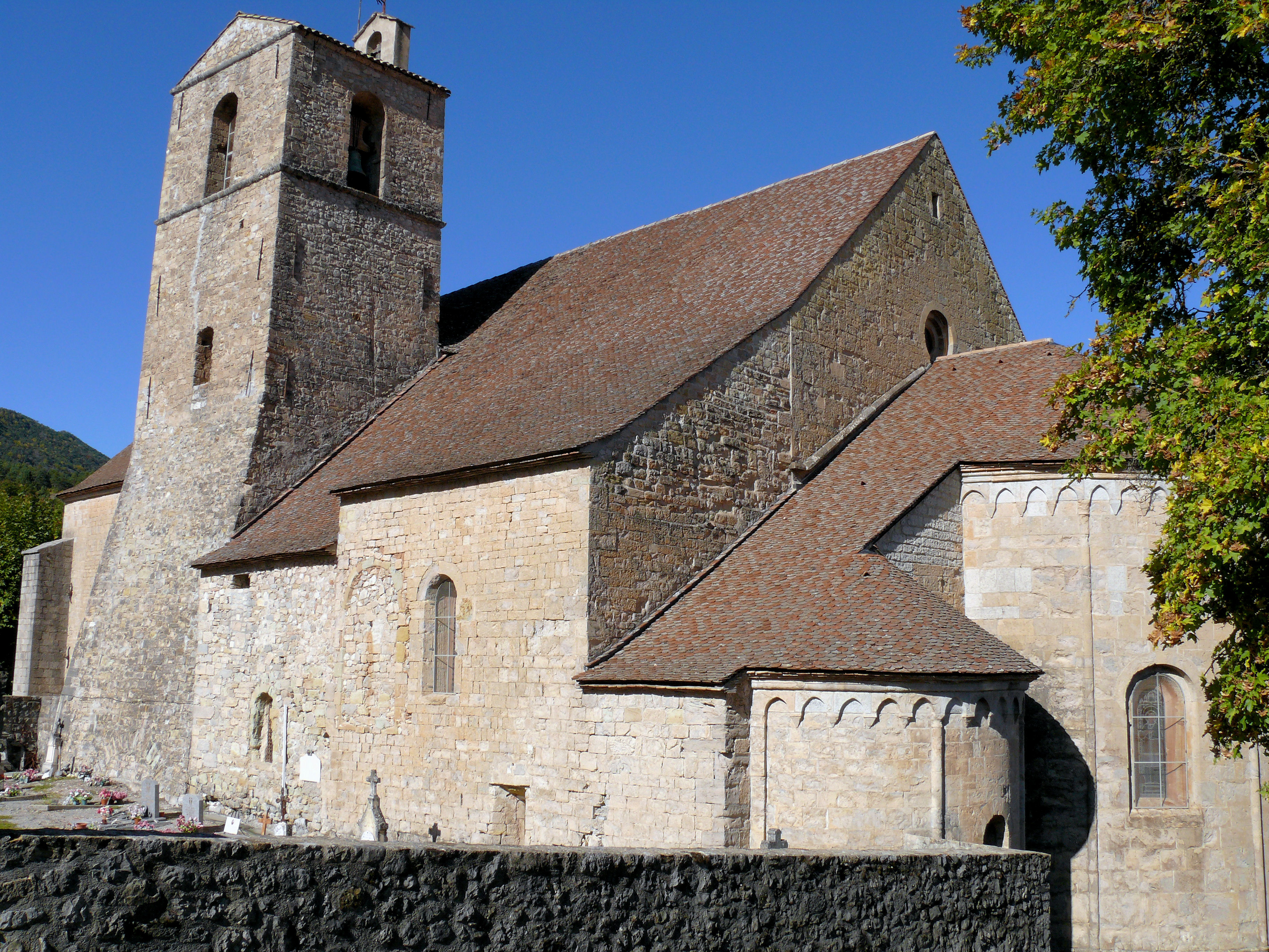 Senez - Cathédrale Notre-Dame-de-l'Assomption - Ensemble côté sud